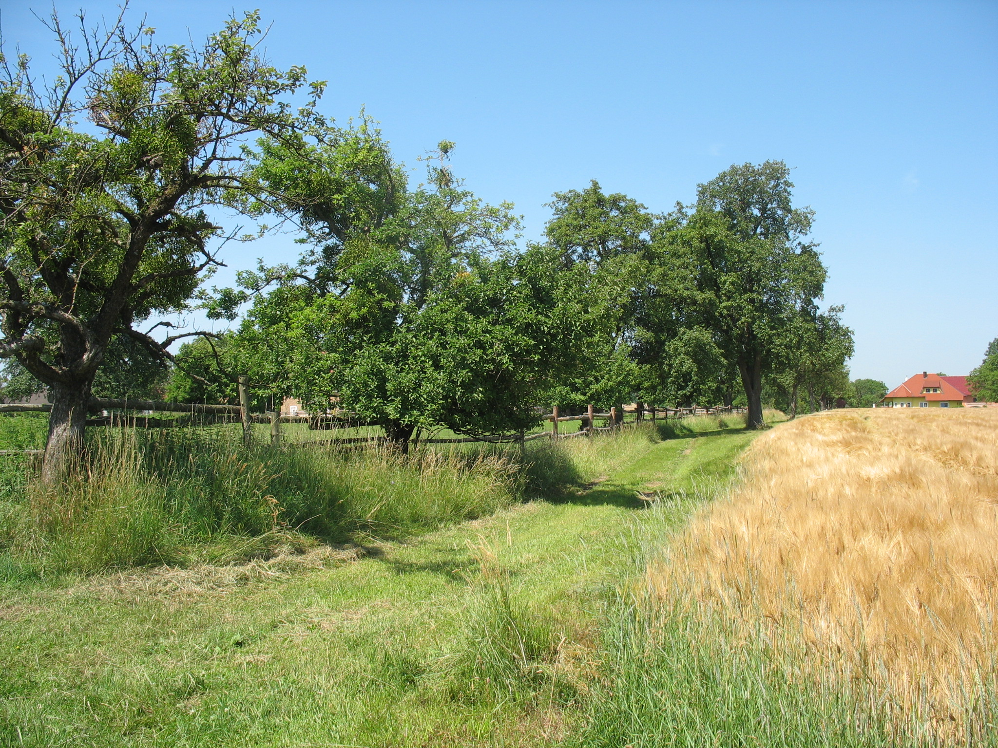 Furt (österreichisch), unbefestigter öffentlicher Geh- bzw. Fahrweg im Gemeindebesitz